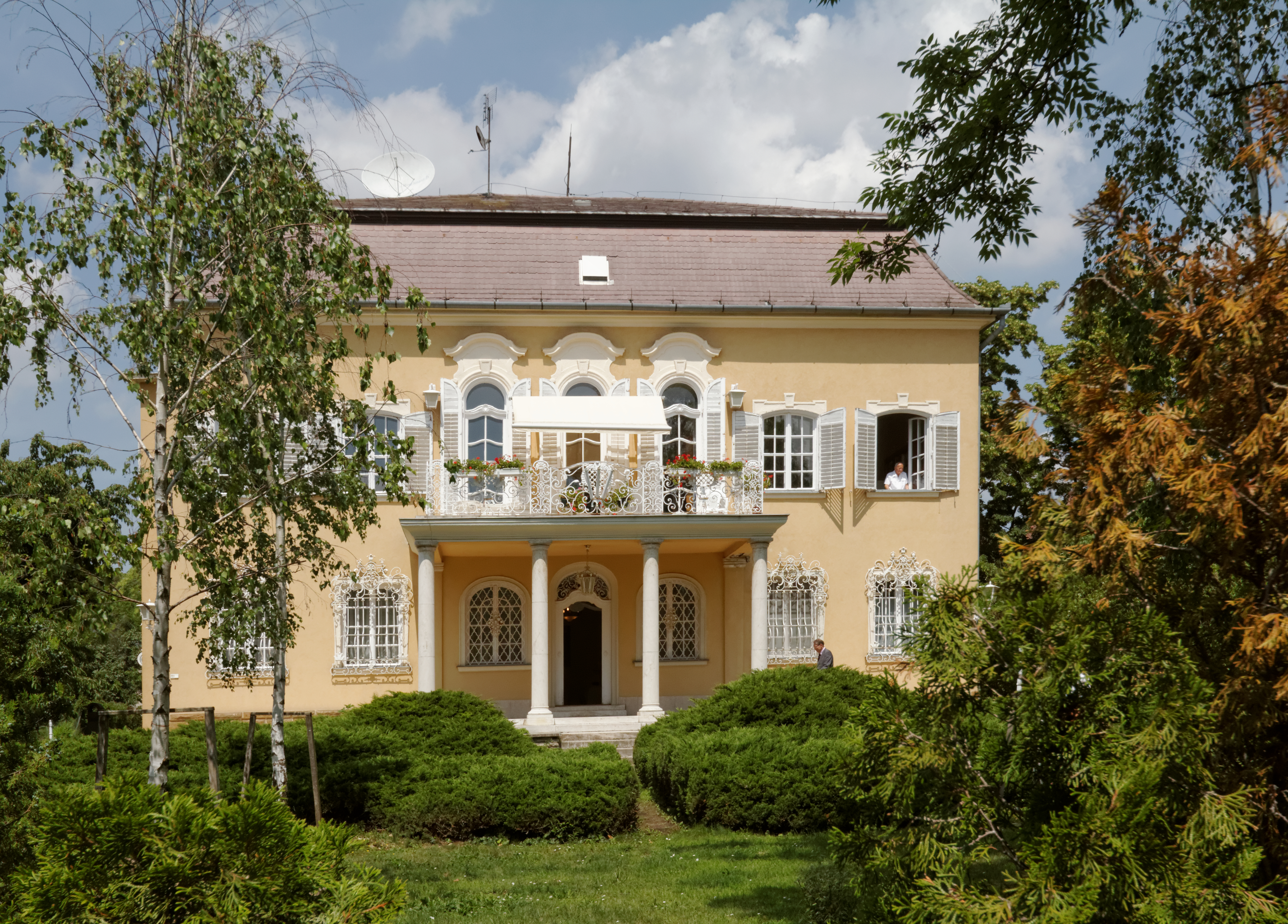 Vorher Residenz von Árpád Göncz; am Fenster oben rechts steht Ápád Göncz Béla király úti állami rezidencia. A 12 hektáros park, 3 épület és az 50 szobás vendégház.